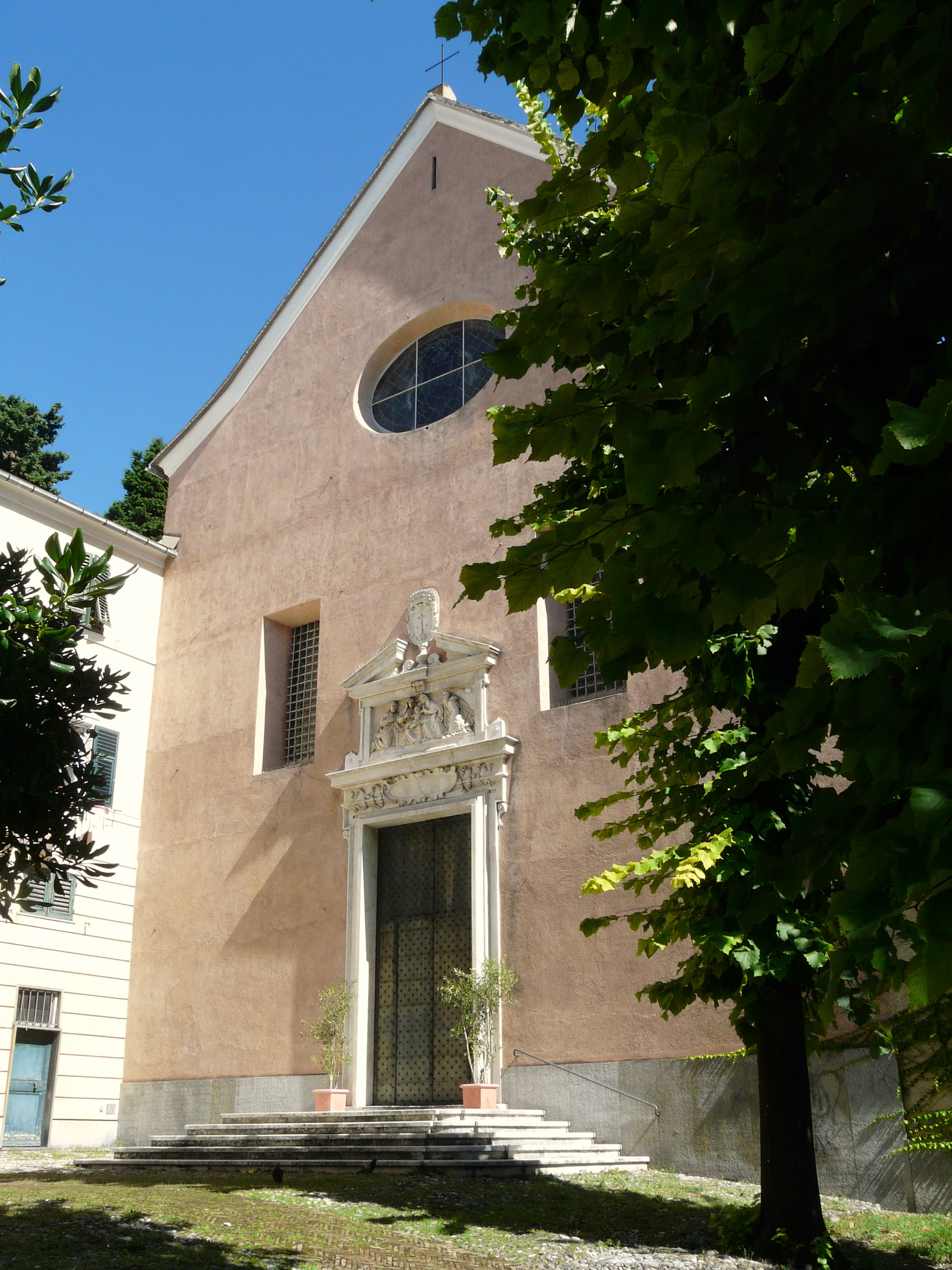 Facciata della chiesa di Sant'Anna, Genova, Liguria, Italia